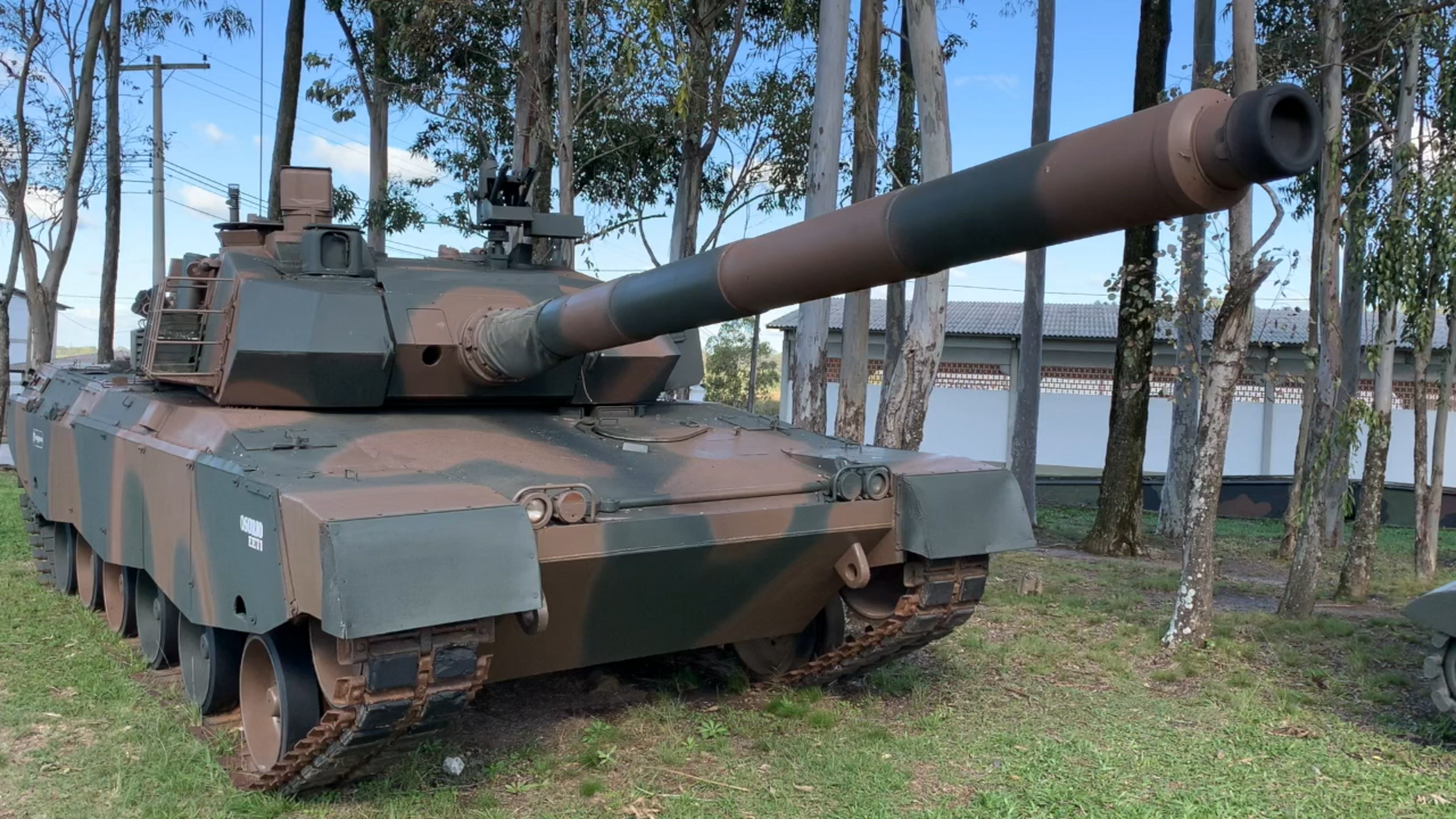 Foto extraída de vídeo gravado no museu ao ar livre, no Centro de Instrução de Blindados.